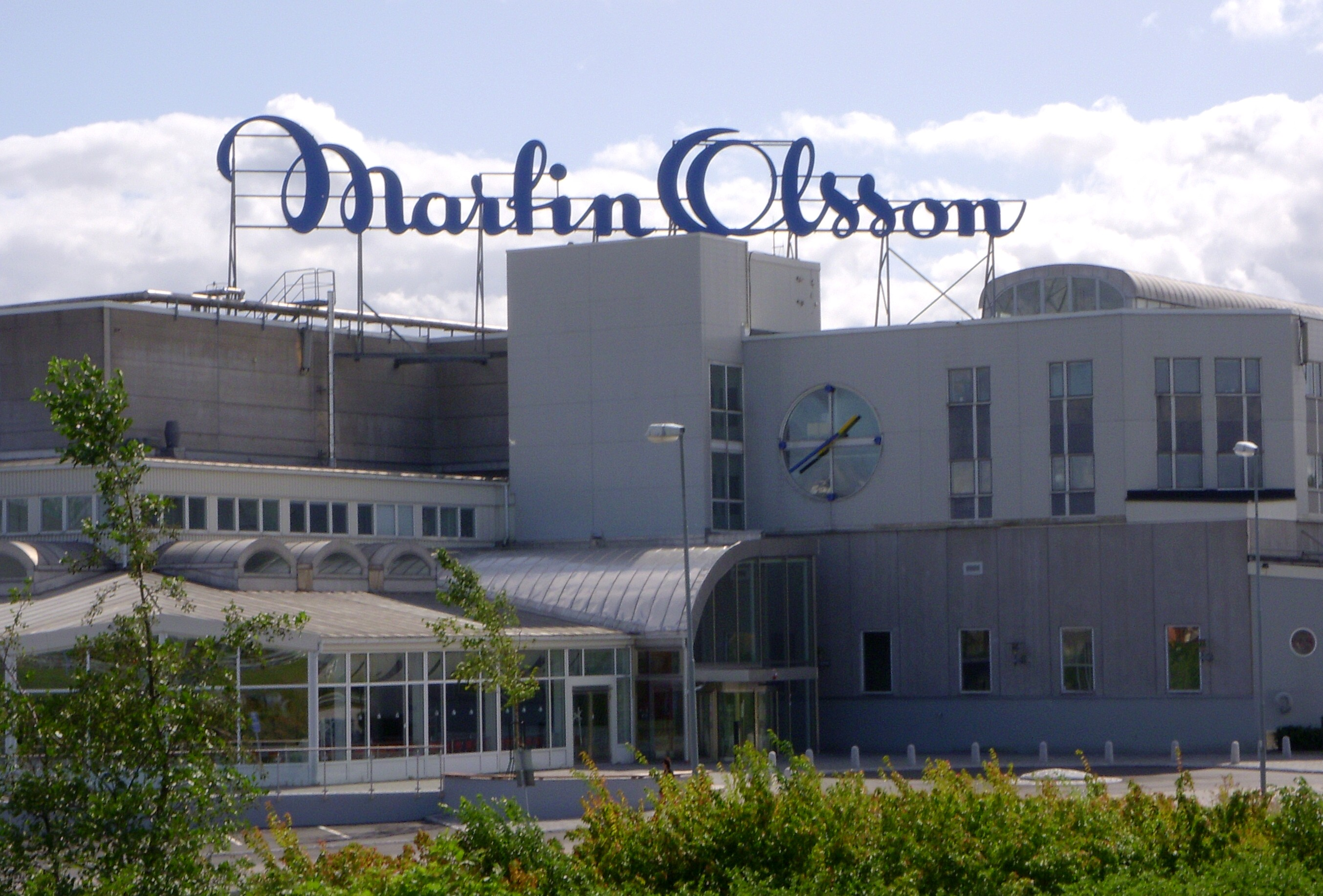 Martin Olssons distributionsanläggning i Årsta